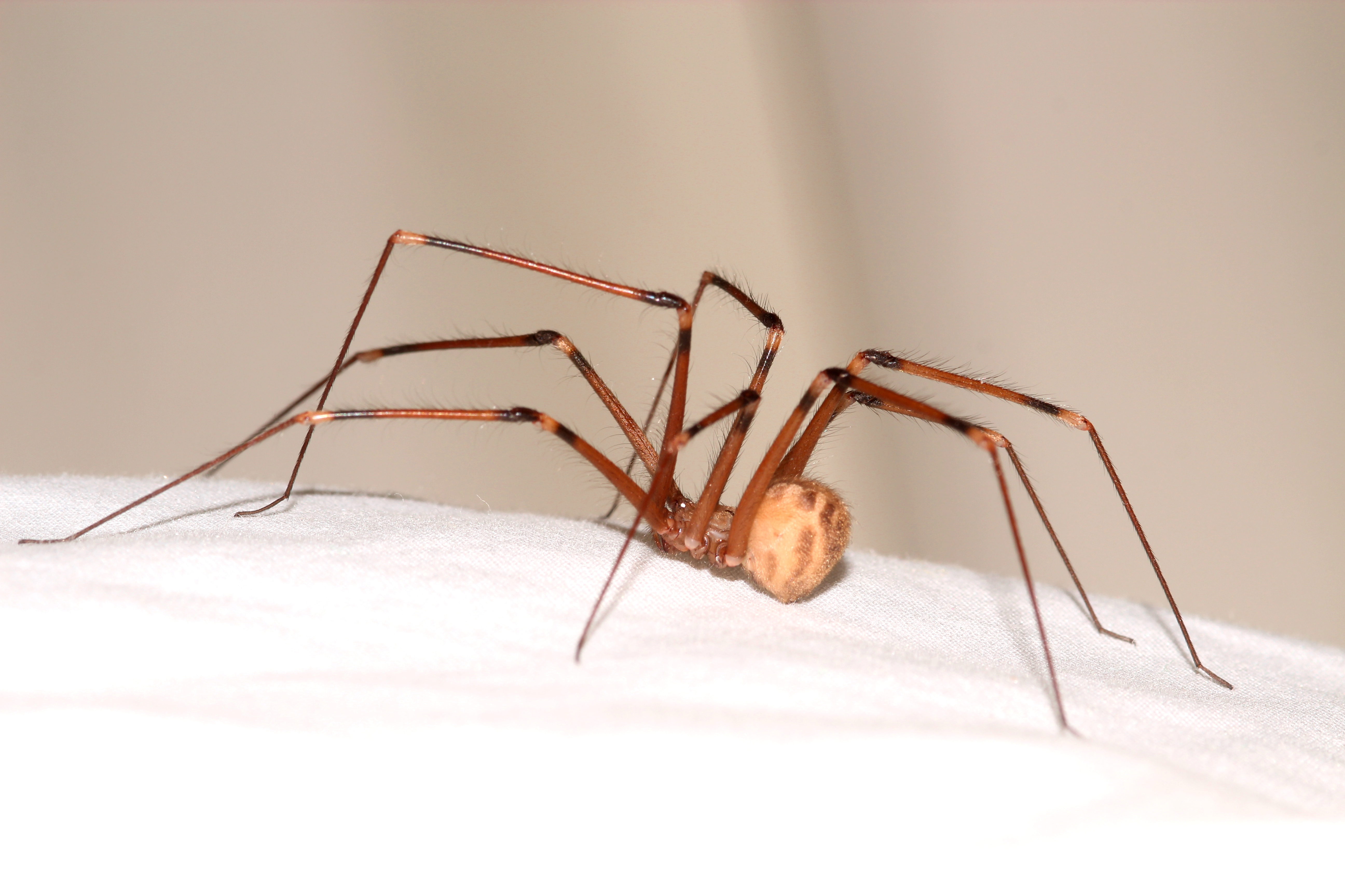 ארטמה נפילית